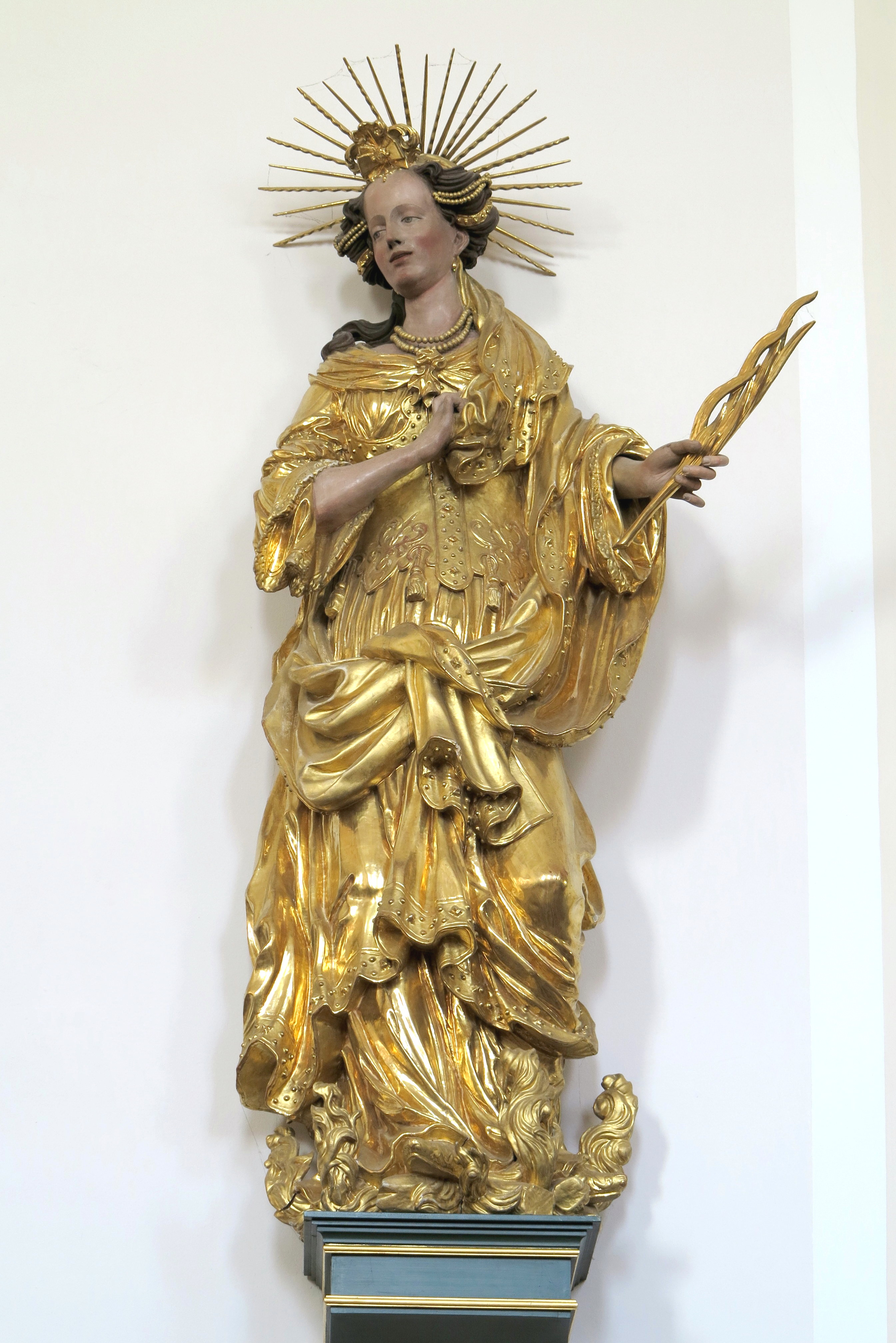 Figur der hl. Afra von Ignaz Waibl in der Pfarrkirche von Reutte